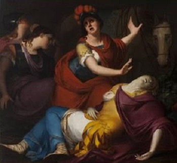 "Le Amazzoni piangono la morte di Pentesilea", olio su tela, 120.50 x 130 cm., coll. privata